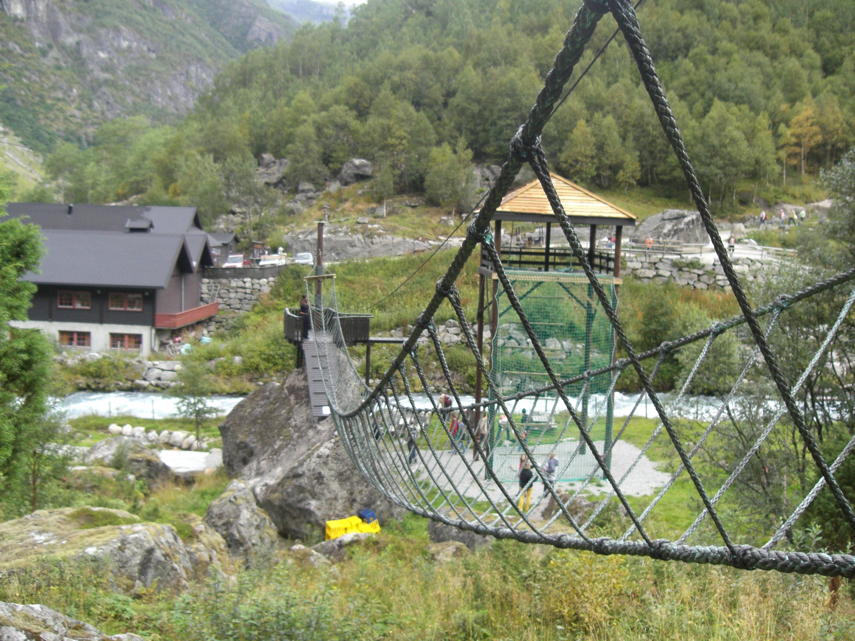 Awesome "monkey bridge" near briksdalsbreen glacier